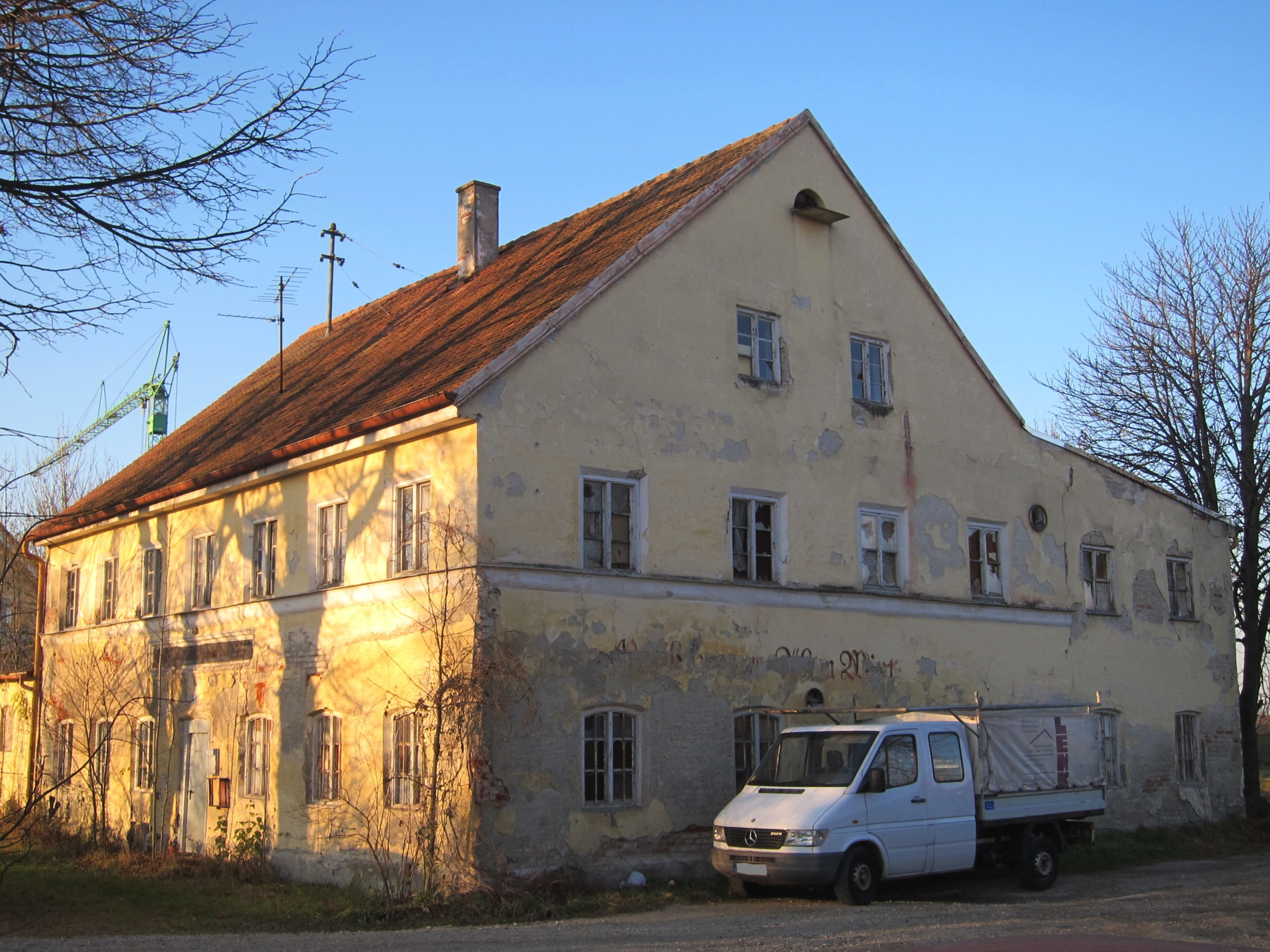 Ehemaliges Gasthaus zum Alten Wirt. Zweigeschossiger Satteldachbau mit flacherem Schleppdach über nördlichem Anbau, klassizistisch, mit Inschrift von 1830.